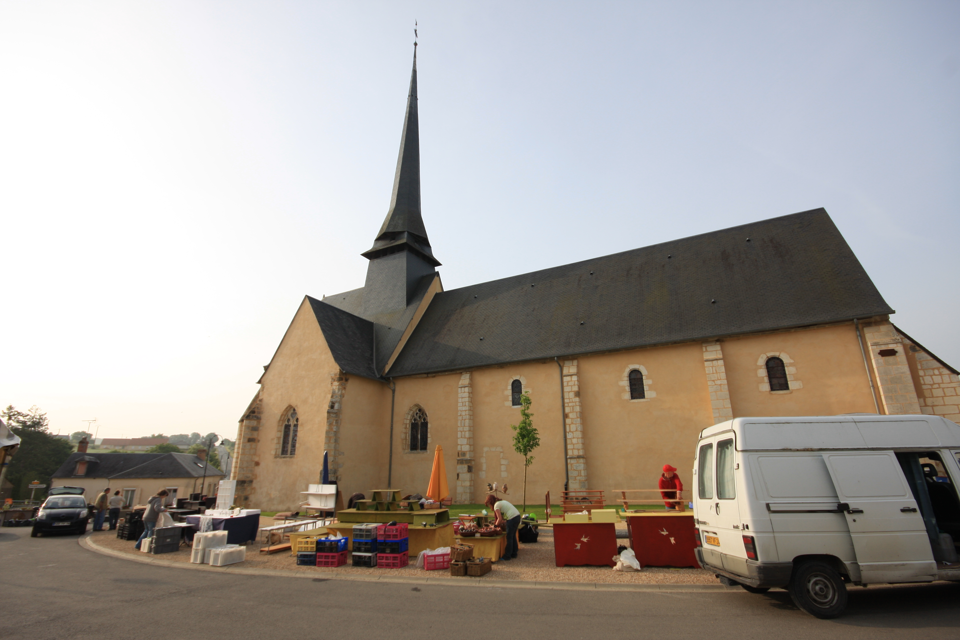 Eglise de Saint Palais